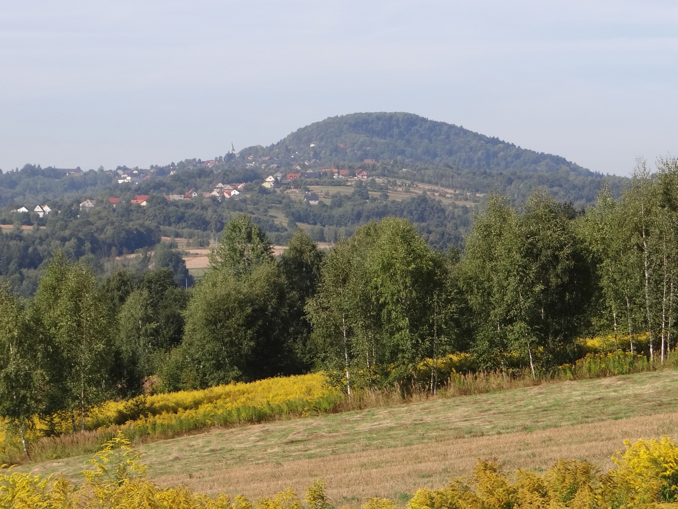 Lanckorona i Góra Lanckorońska, widok z północno-wschodniej strony